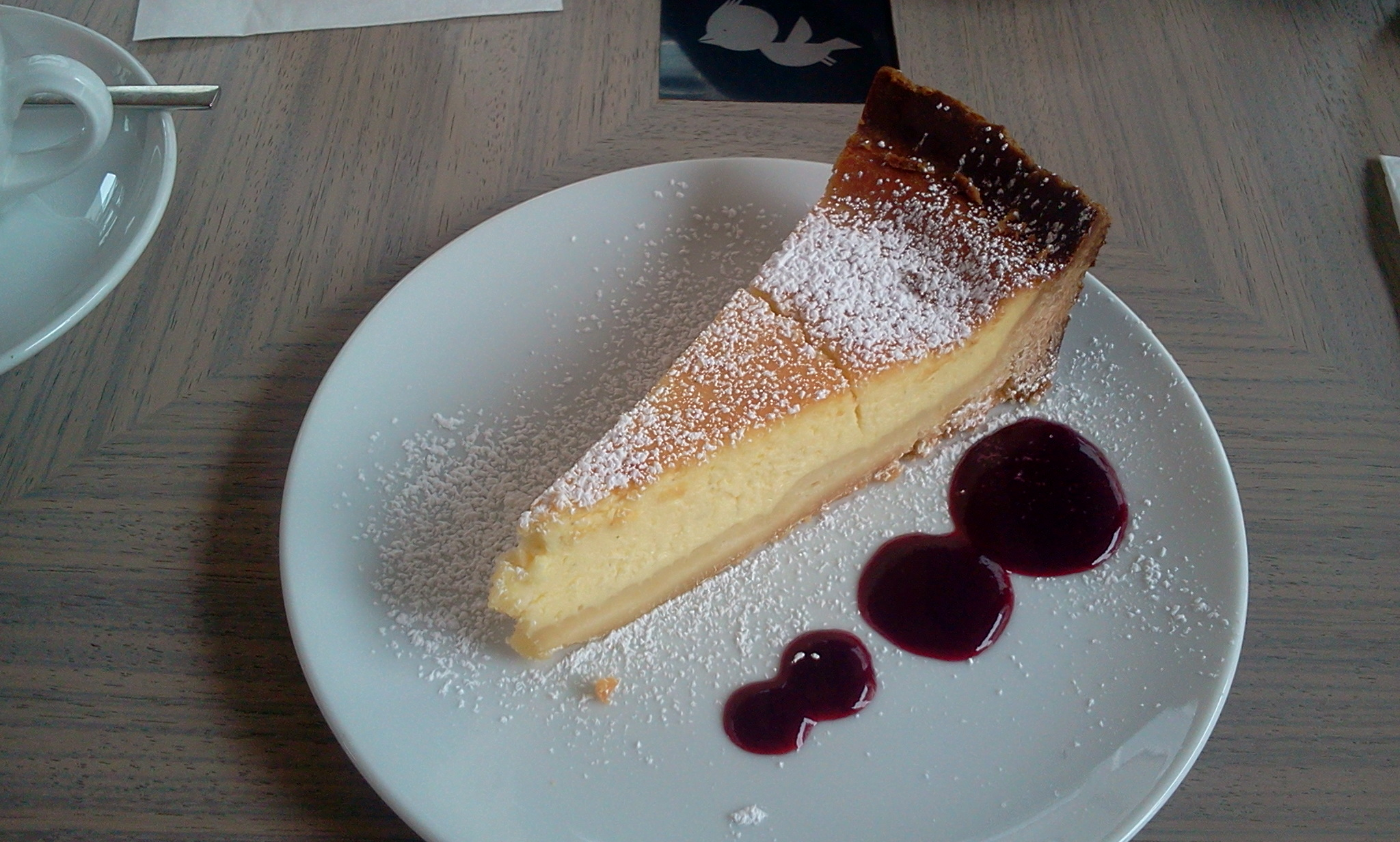 Käse-Schmand-Kuchen auf einem Waldfruchtspiegel